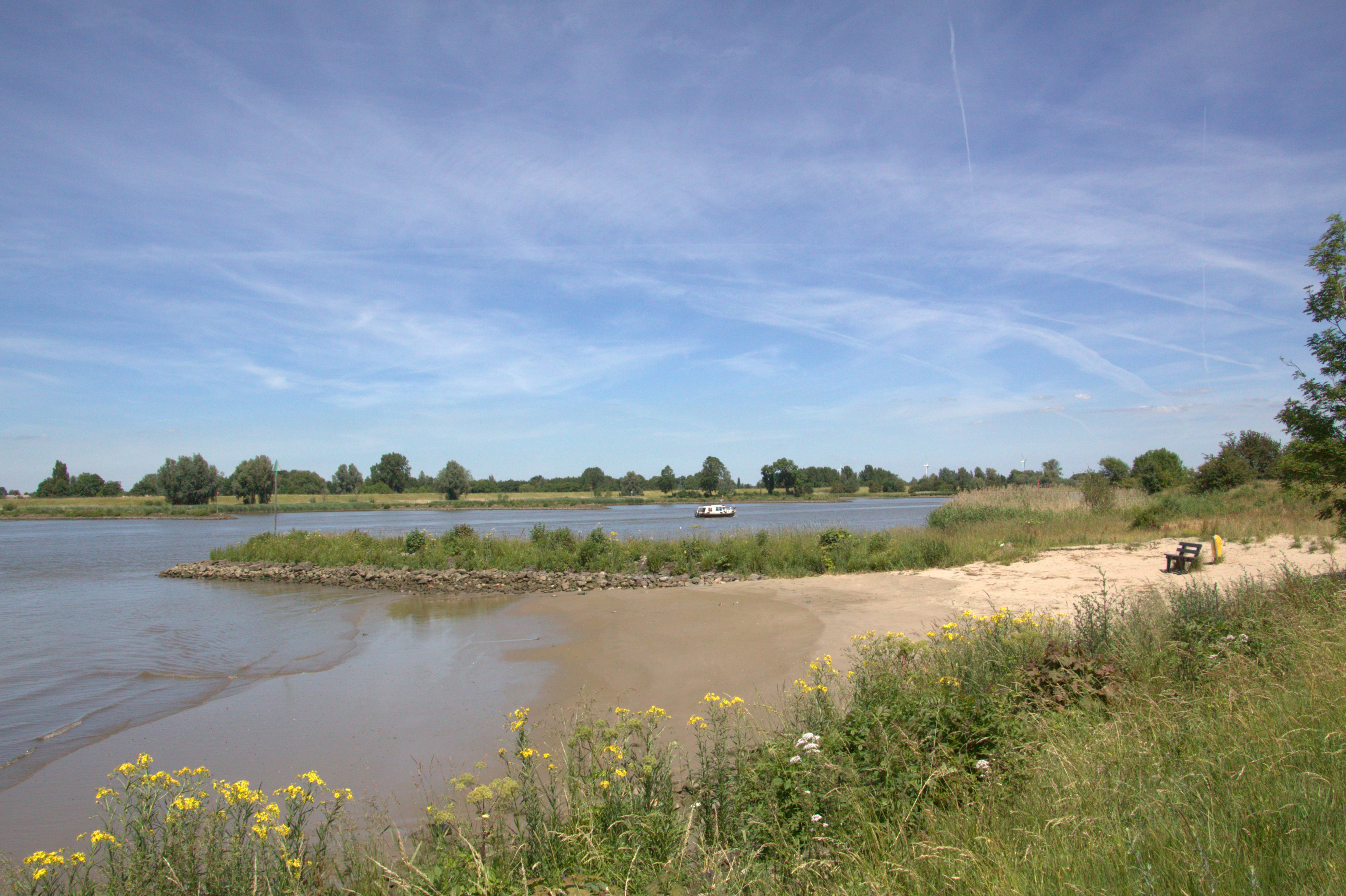 In de uiterwaarden van rivier de lek bij ket dorp Tienhoven a/d Lek in de gemeente Vijfheerenlanden Op dit moment wel mooi maar erg droog, de bijzondere vegetatie heeft er onder te lijden, Mei-Juni 2017.